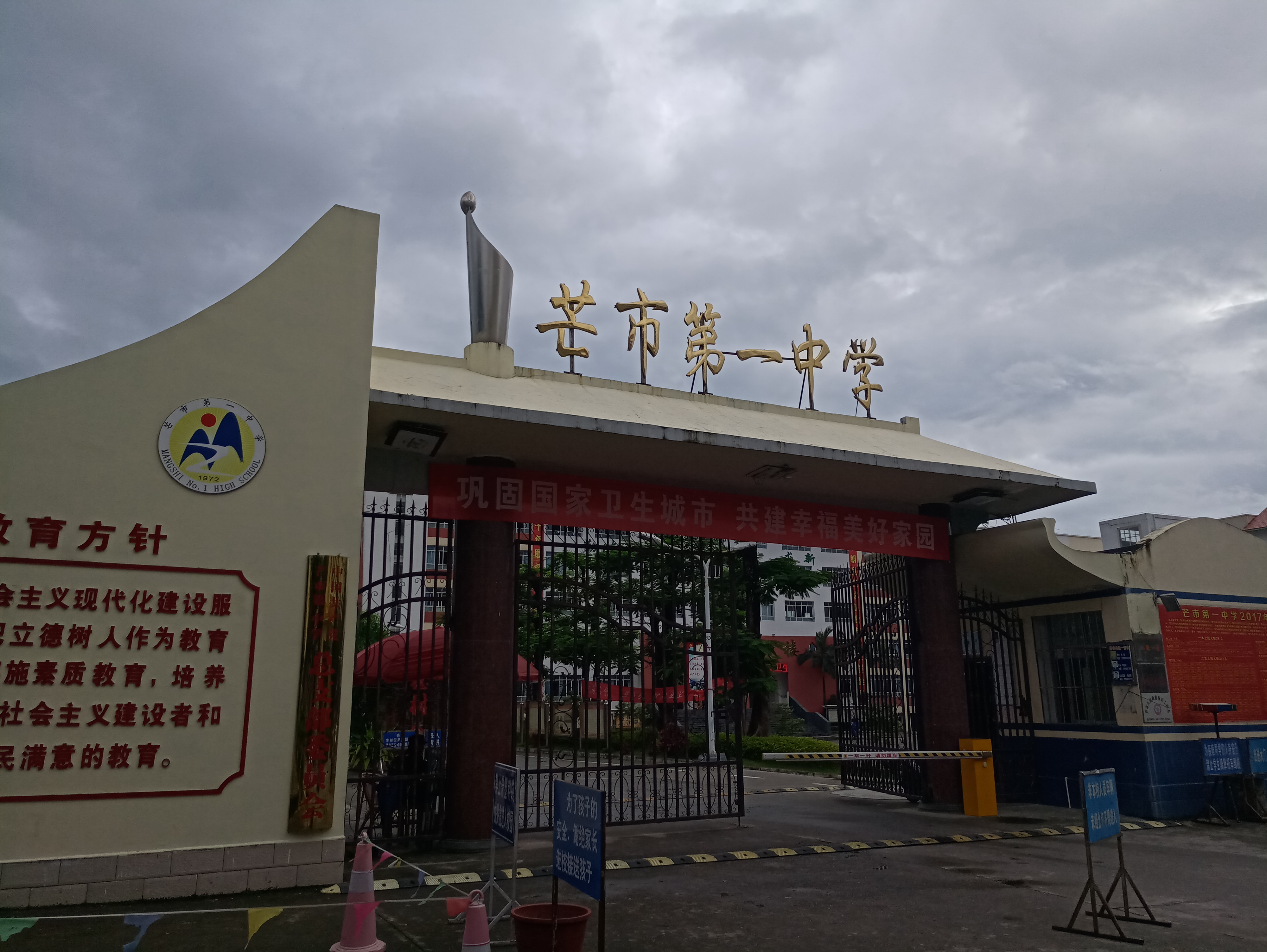 芒市第一中学-校门